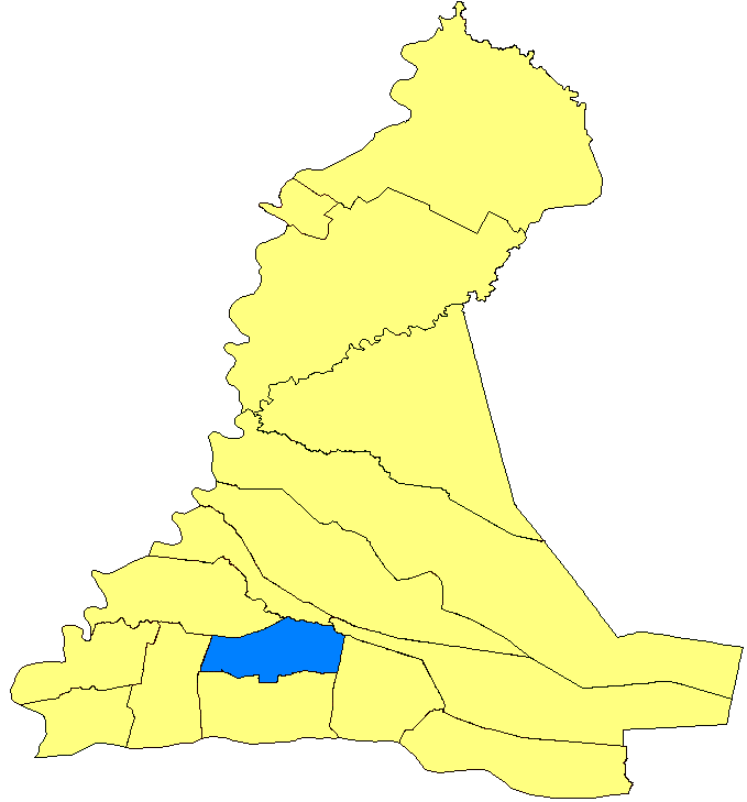 Mapa de Desmochados, Paraguay.